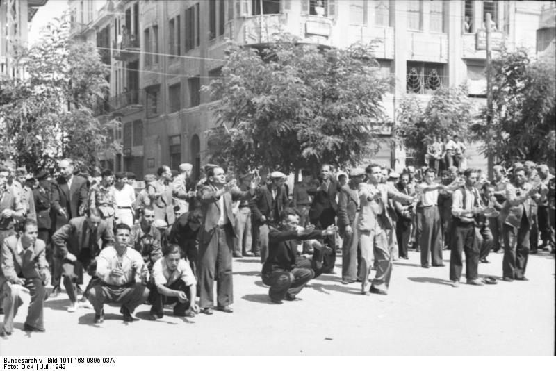 Scherl; Griechenland: In Übereinstimmung zwischen den deutschen und griechischen Stellen werden jetzt die Juden in Griechenland erfasst und einer nutzbringenden Arbeit zugeführt. Kriegsberichter Dick, Juli 1942 Information added by Wikimedia users.